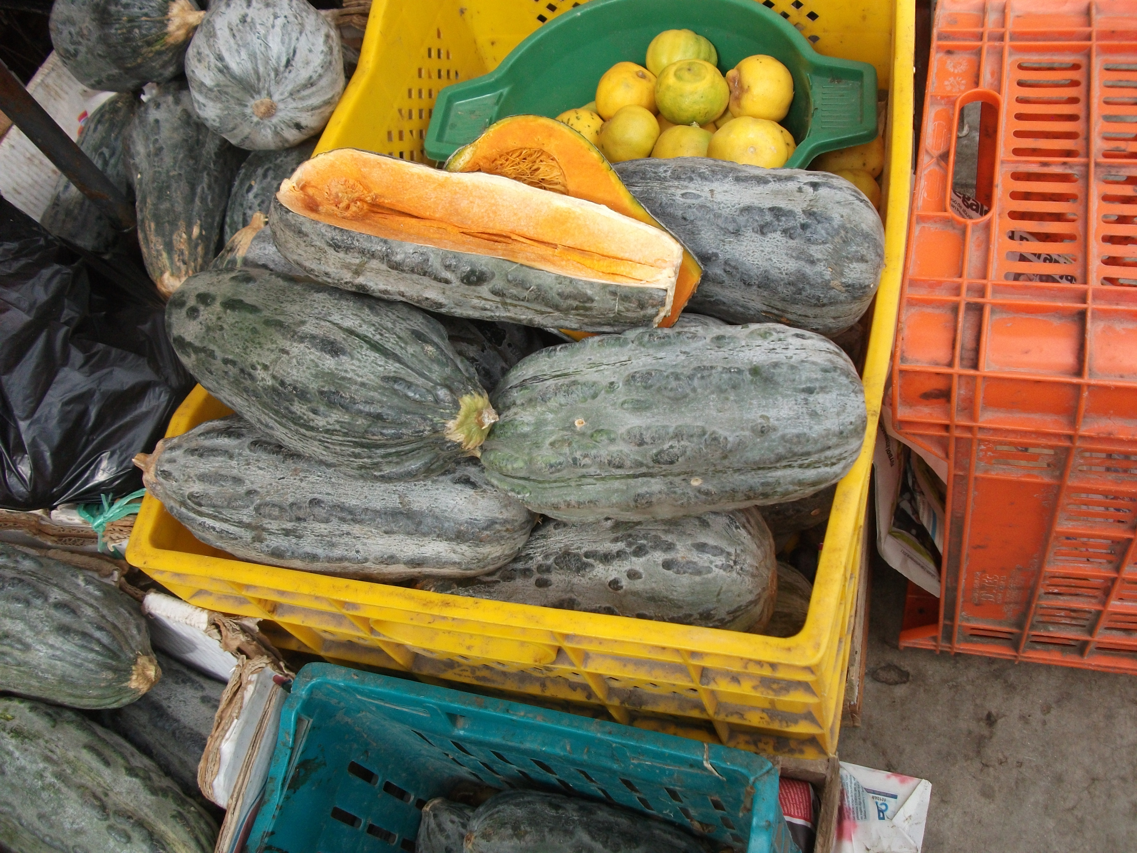 Venta de zapallos loche en Chiclayo (Perú)